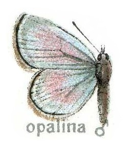 Arhopala opalina